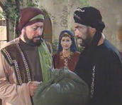 wamadat02